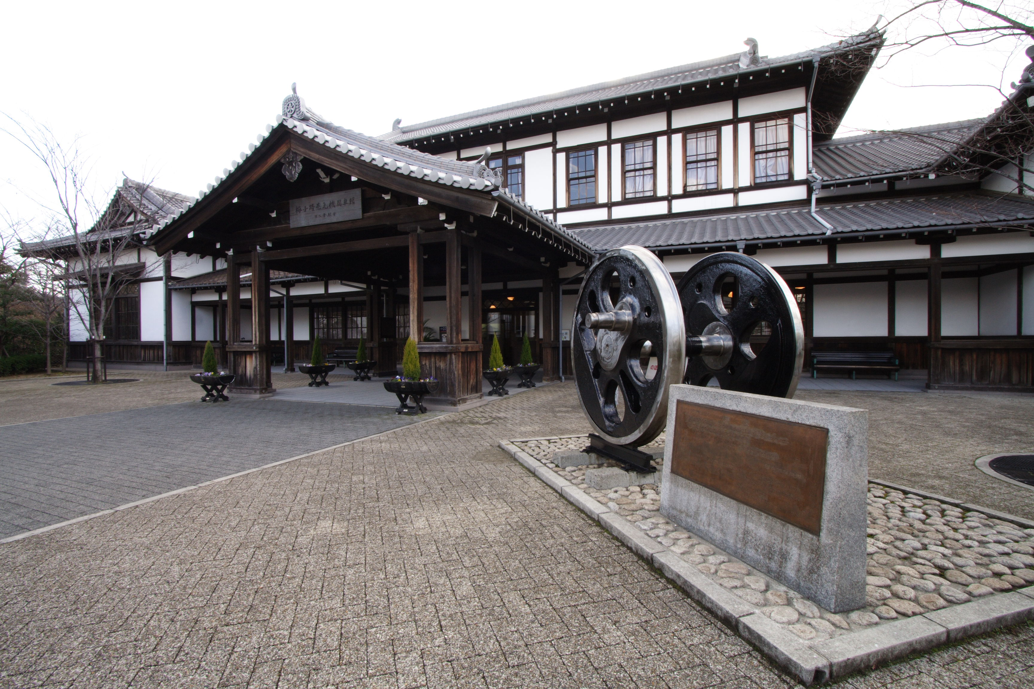 Umekōji SL Museum in Kyoto